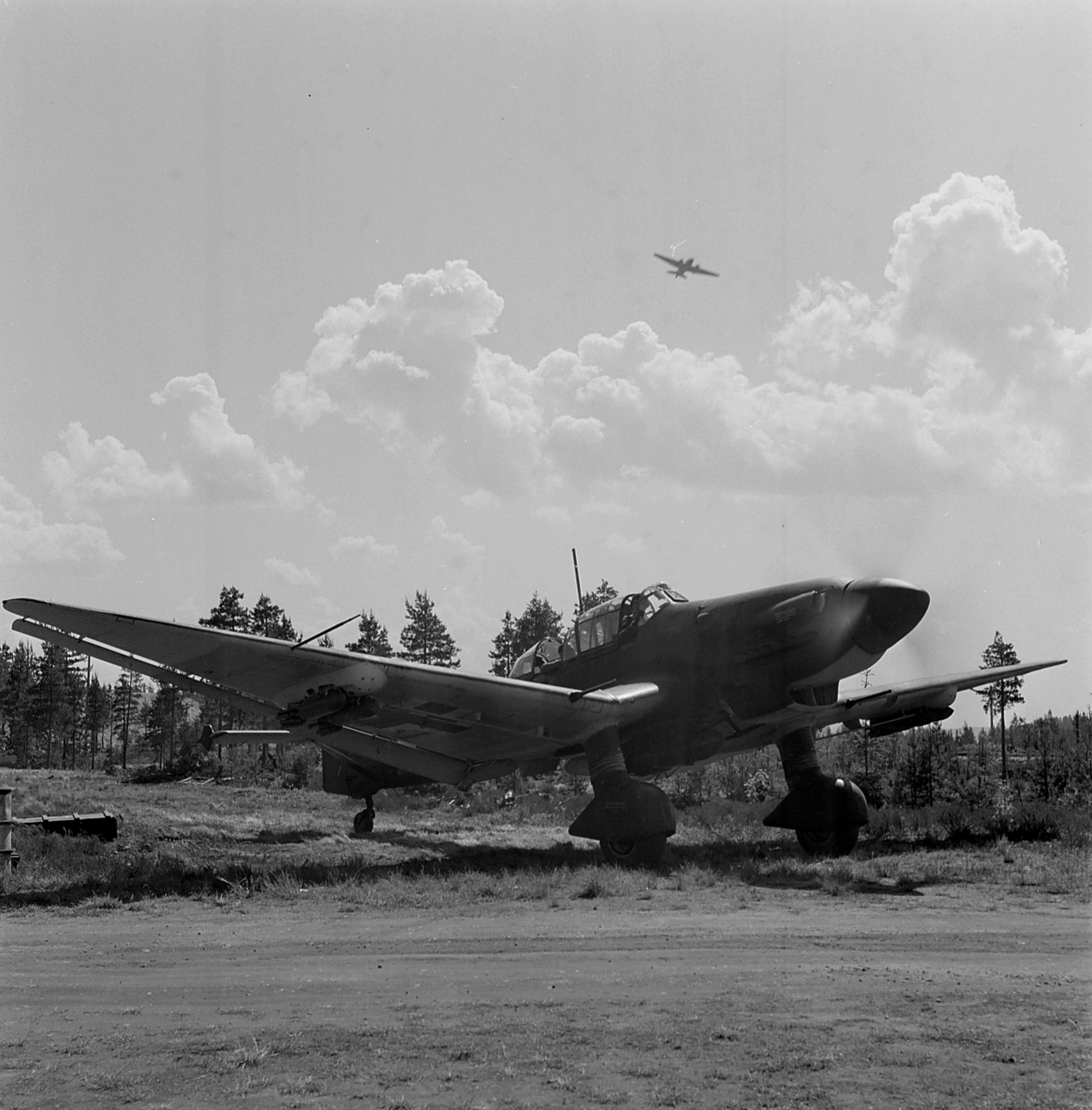 Stuka-syöksypommittajat starttaavat pommitusmatkalle Talin siltoja tuhoamaan. (Kuvassa on Junkers Ju 87 D-5) Kuvauspaikka: Immolan lentokenttä